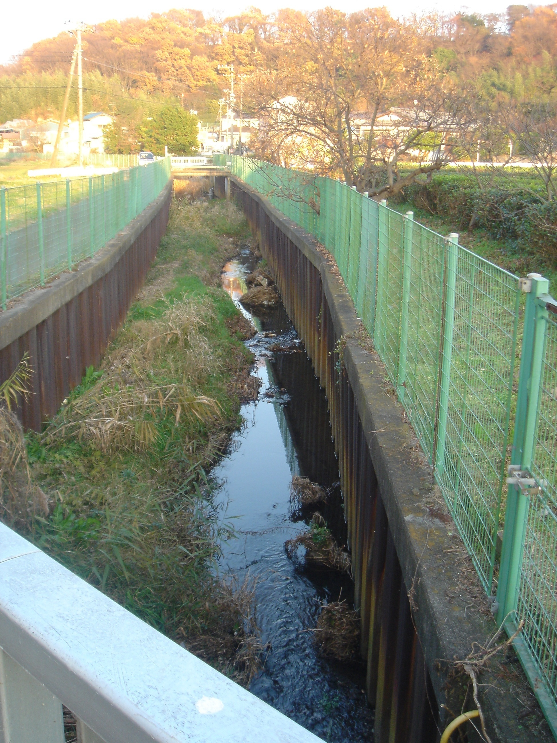 金目川水系、三笠川の画像。平塚市土屋にて撮影。